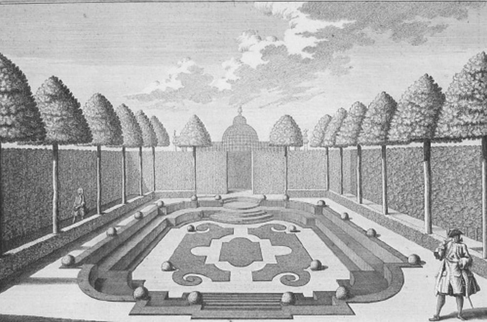 Boulingrin entouré de Tillevils, par le quel on va a la Voliere. (Boulingrin surrounded by Tillevils; Tillevils = Lime trees = Linden = Tilia)